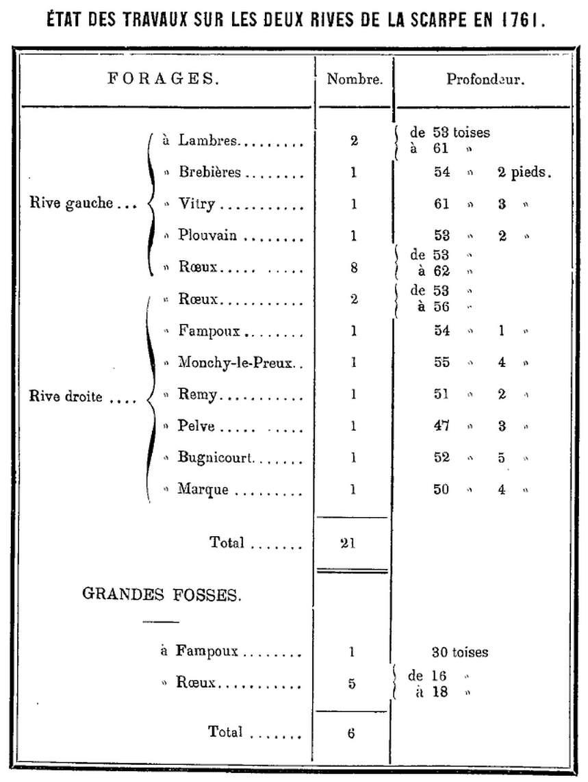 Le Bassin Houiller du Pas-de-Calais. Tome III, 1883 - Émile Vuillemin est un ouvrage dans le domaine public, numérisé par Gallica, la bibliothèque numérique de la Bibliothèque nationale de France. Cet ouvrage permet de sourcer de manière fiable les articles concernant le Bassin minier du Nord-Pas-de-Calais. Extrait de la page n° 31 de l'ouvrage, dans le but d'enrichir l'article Compagnie Wuillaume-Turner.